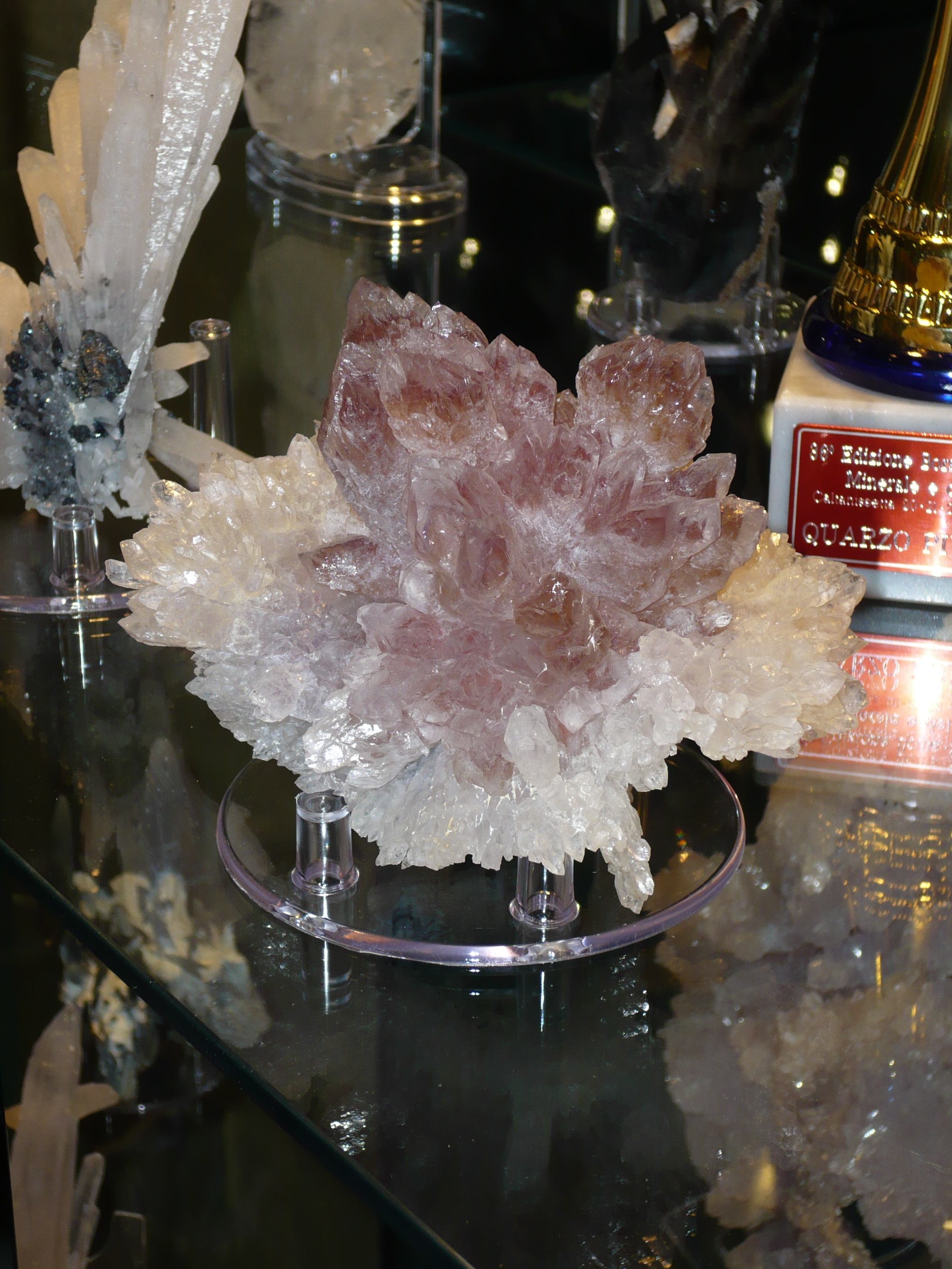 Quarzo ametista su rosa di quarzo bianco. Vincitore come miglior minerale della 36ma Mostra concorso del minerale di Caltanissetta nei Locali del Museo Mottura